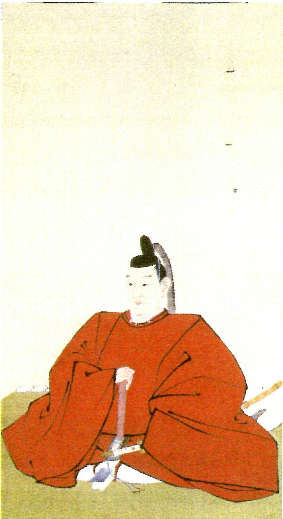 浅野長重の肖像。